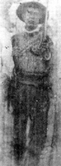 El general zapatista Jose Trinidad Ruiz